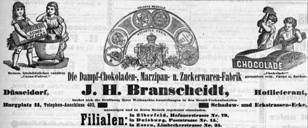 Anzeige J. H. Branscheidt, in Düsseldorfer Volksblatt (No. 347), vom 21. Dezember 1890